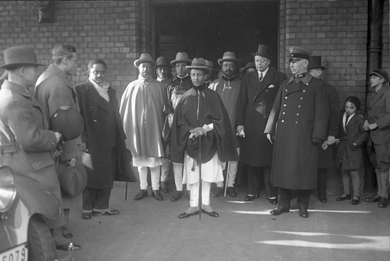 Der abessinische Kronprinz Asfau Wossan in Berlin ! Der 17 jährige Kronprinz Asfau Wossan von Abessinien (Mitte) mit seinem Gefolge während seines Aufenthaltes in Berlin.